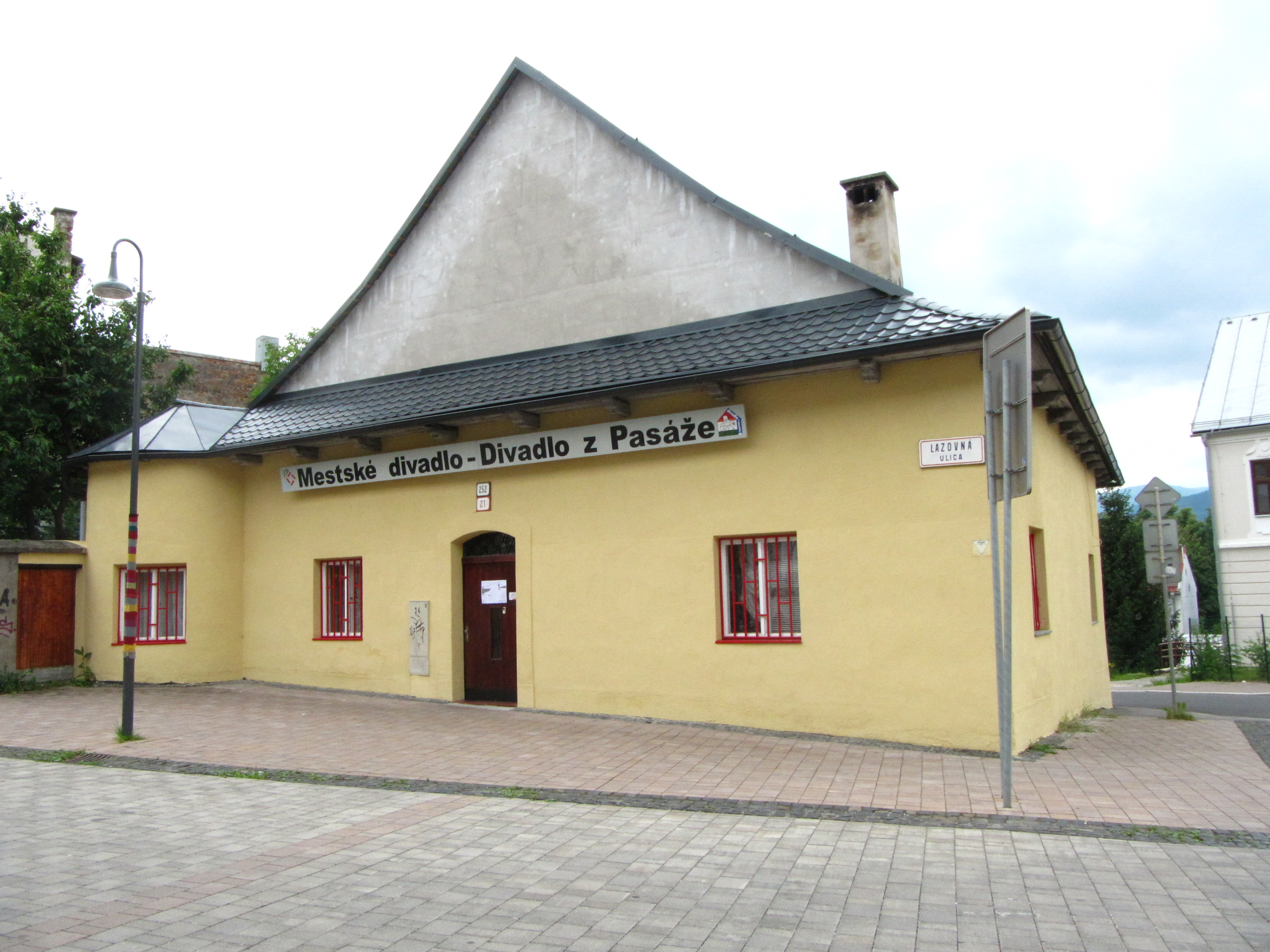 Divadlo z Pasáže v Banskej Bystrici